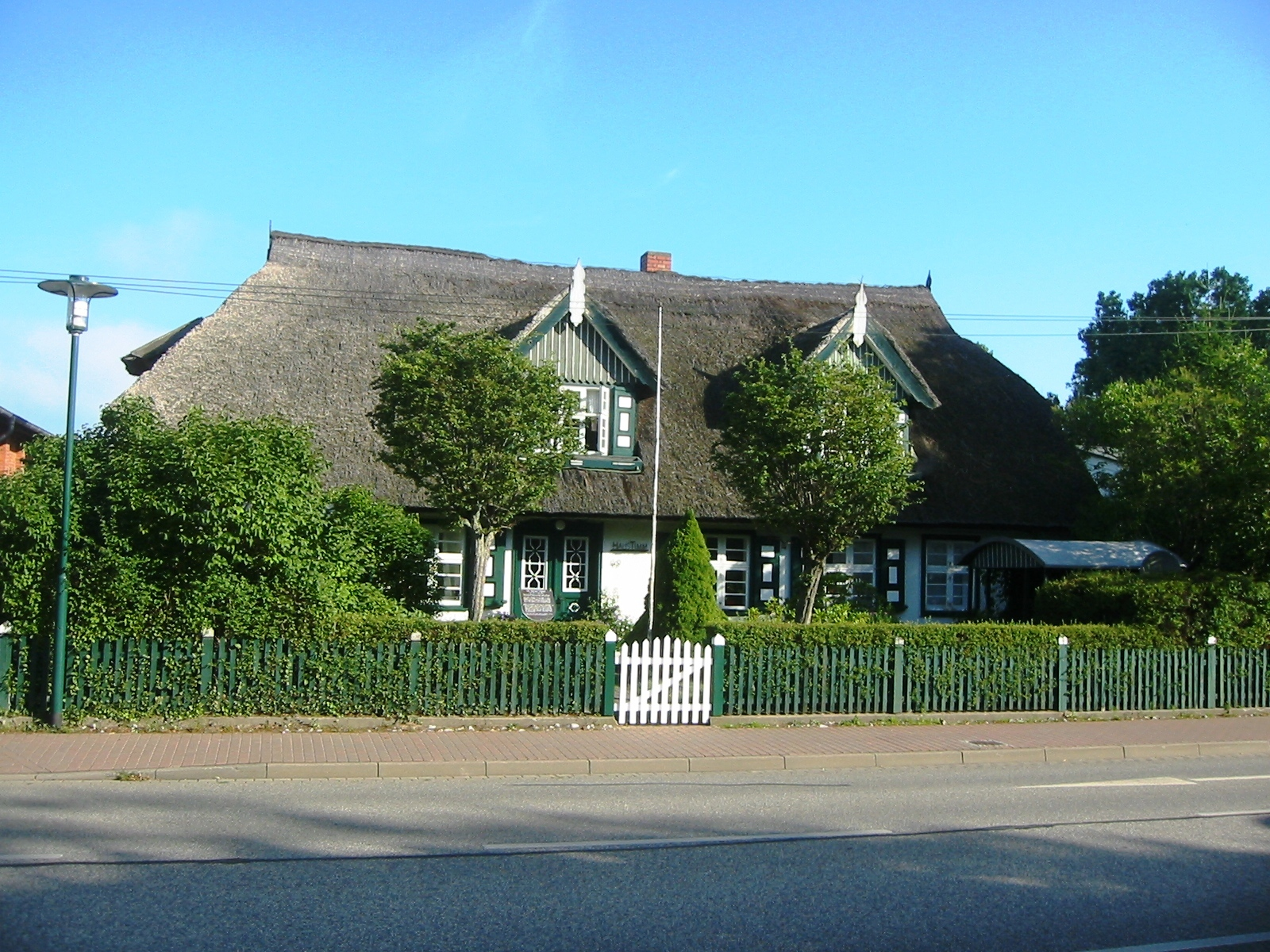 Elternhaus von Dr. Werner Timm in der Ribnitzer Straße in Graal-Müritz